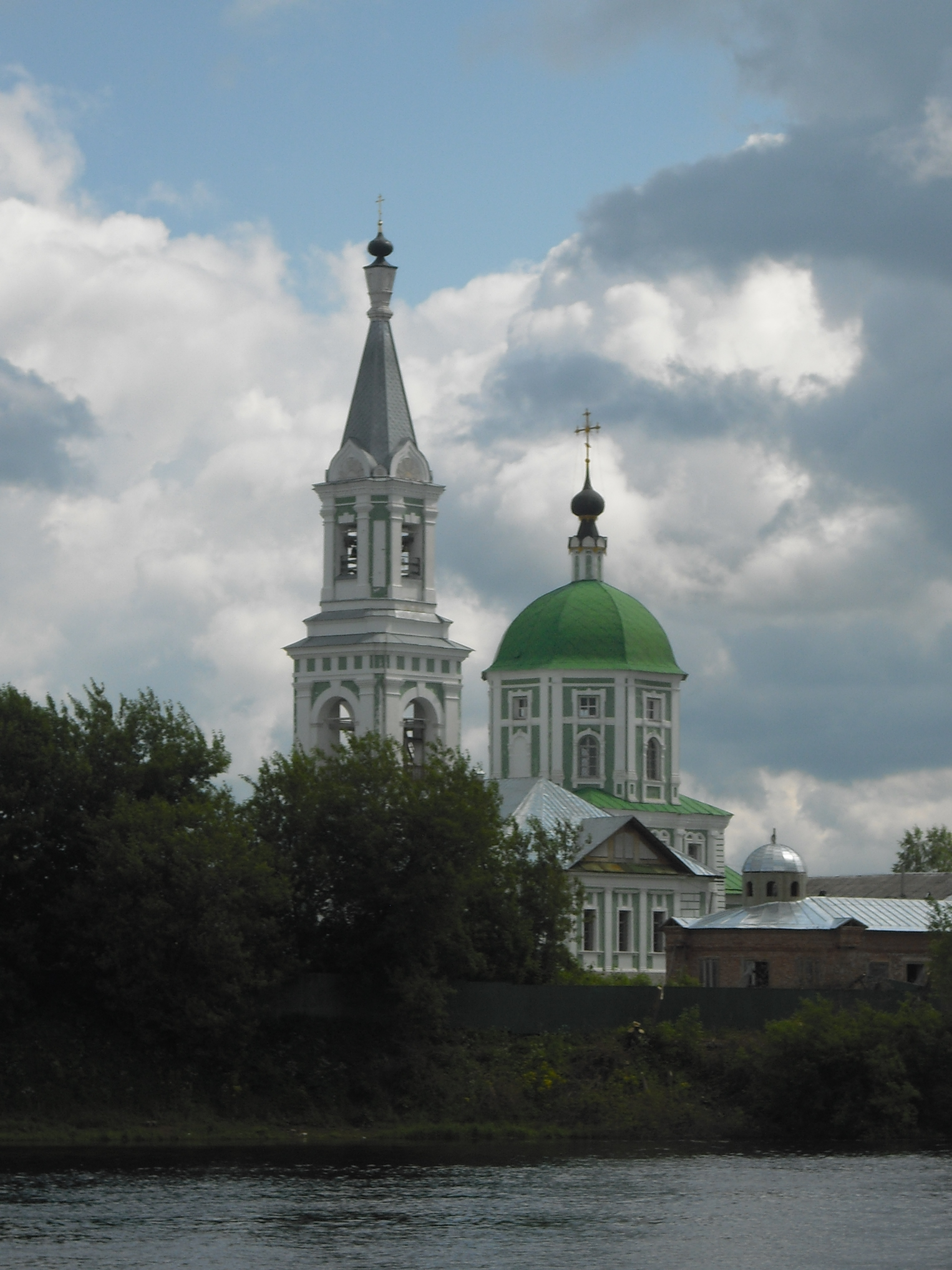 Церковь Великомученицы Екатерины Свято-Екатерининского женского монастыря в Твери